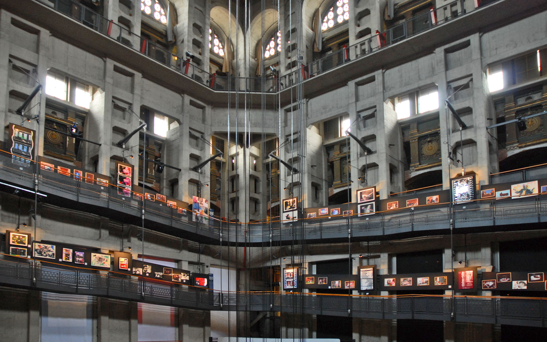 Museo nazionale del Cinema in Turin - Italy